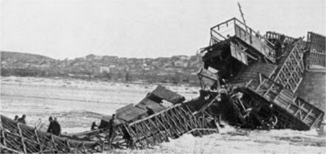 Brückeneinsturz bei Czernowitz